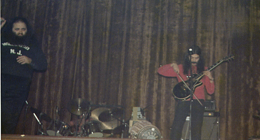 bancolive